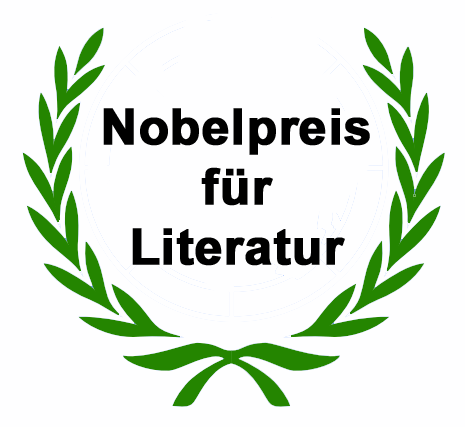 Literaturnobelpreis